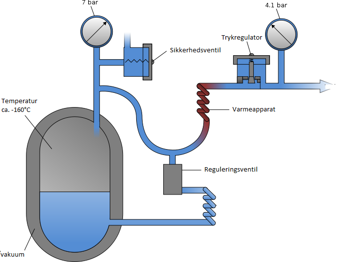 Vacuum Insulated Evaporator diagram